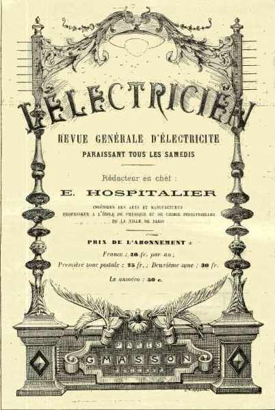 Page de garde de la revue l’Électricien, fondée en 1881.